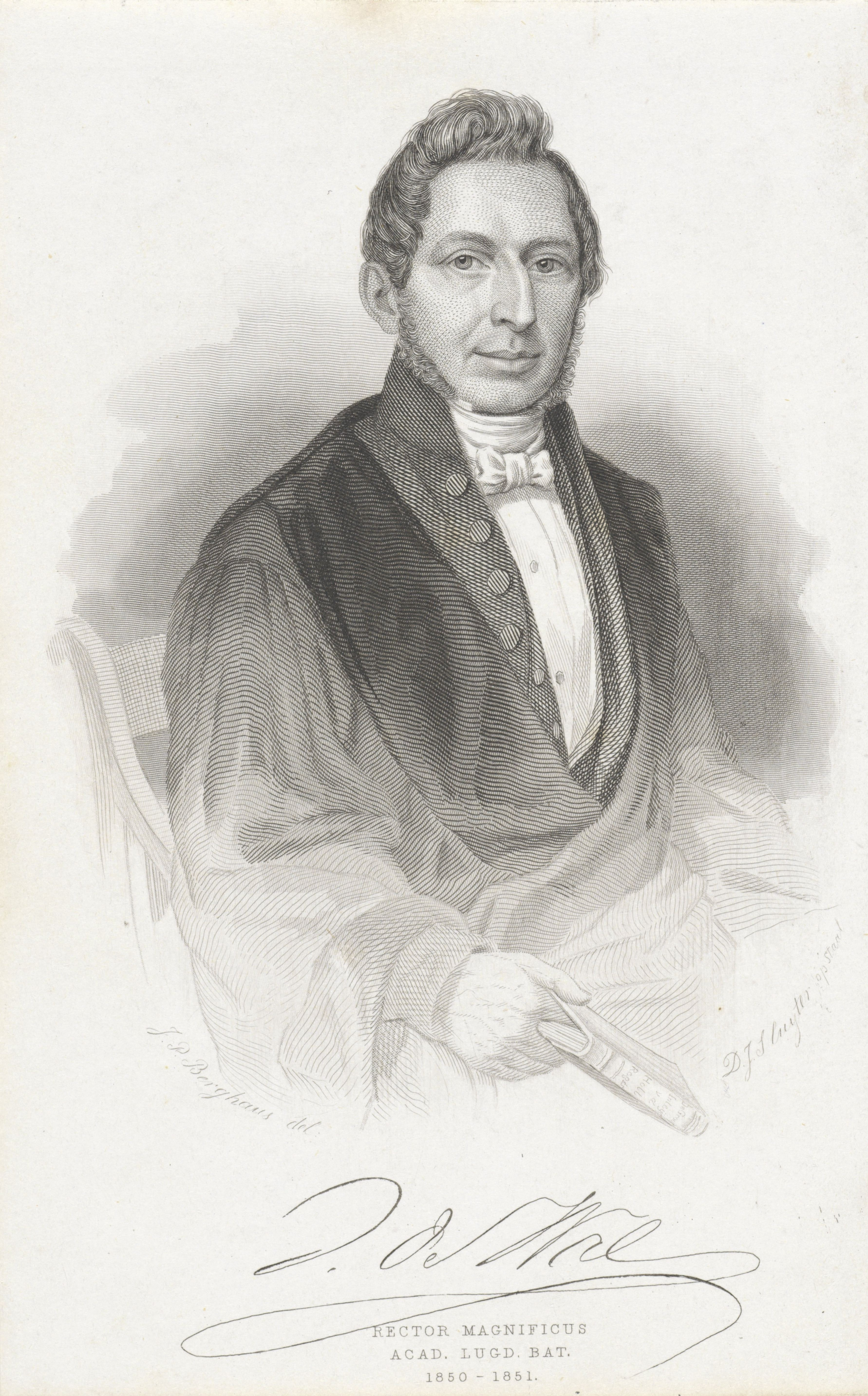 Portret van de Leidse rector magnificus Johan de Wal. Onder het portret zijn handtekening en de periode waarin hij het rectoraat bekleedde (1850-1851).